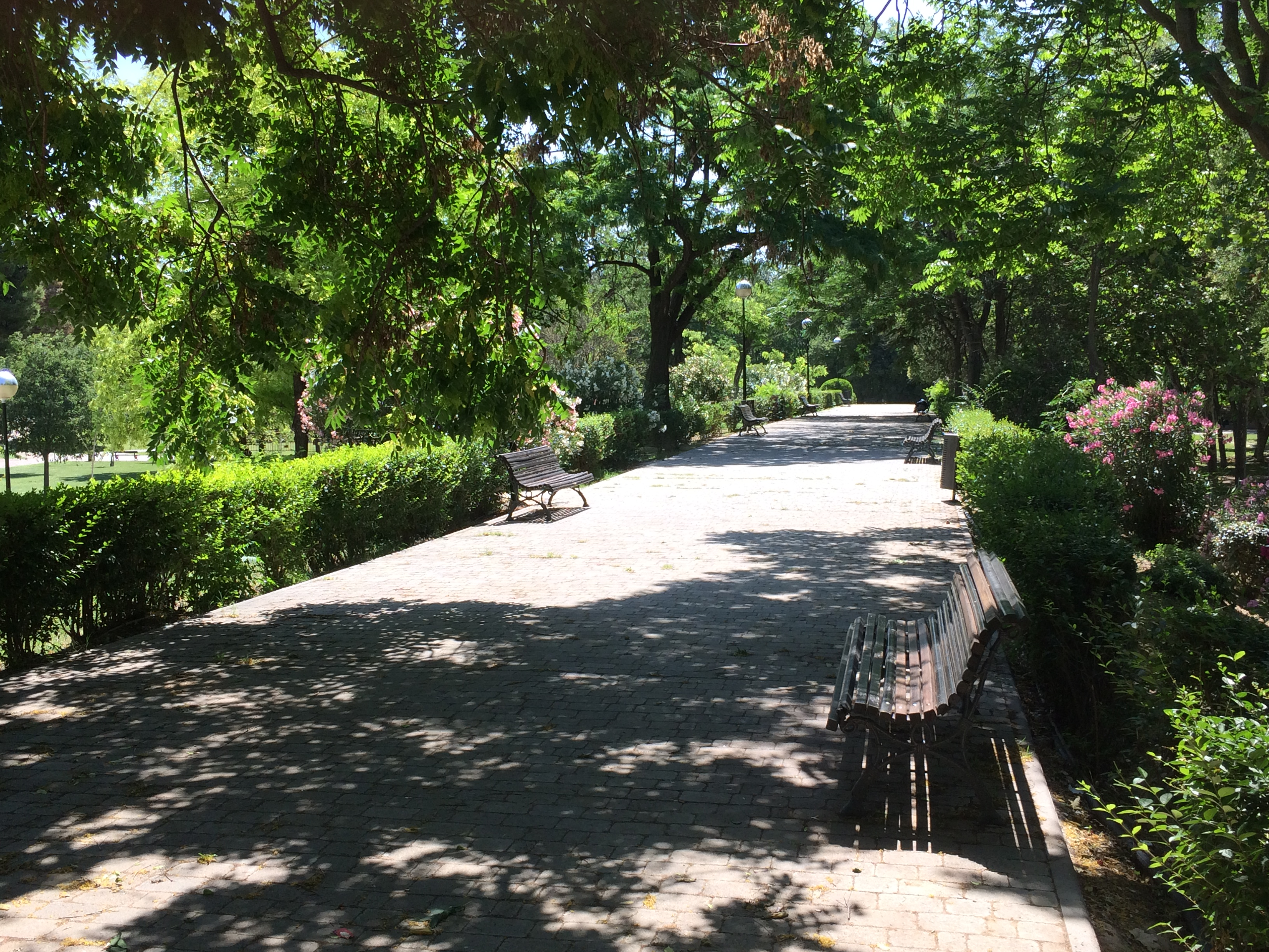 Paseo en el Parque Bruil de Zaragoza